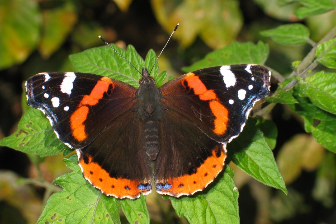 Admiral (Vanessa atalanta)